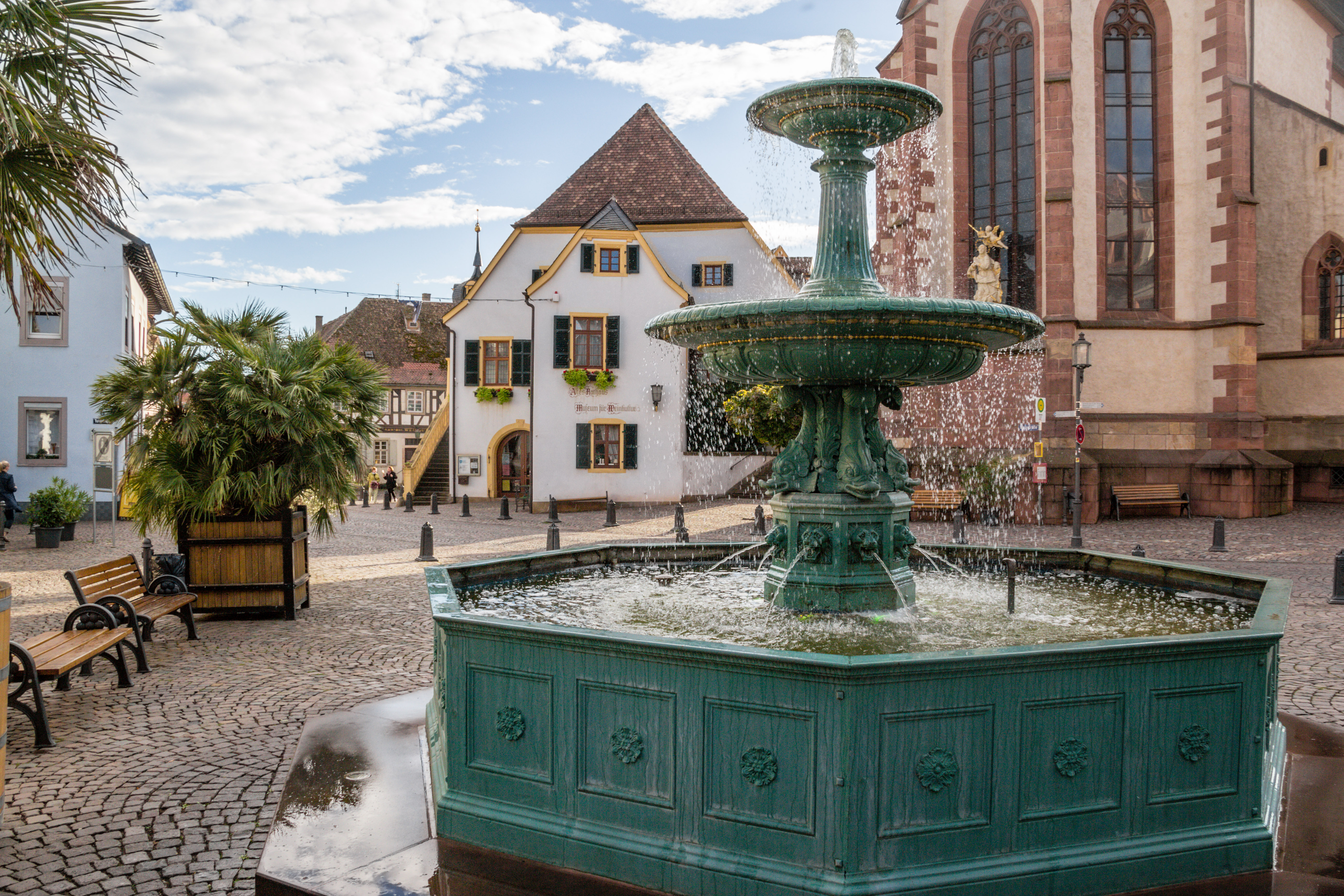 Deidesheim